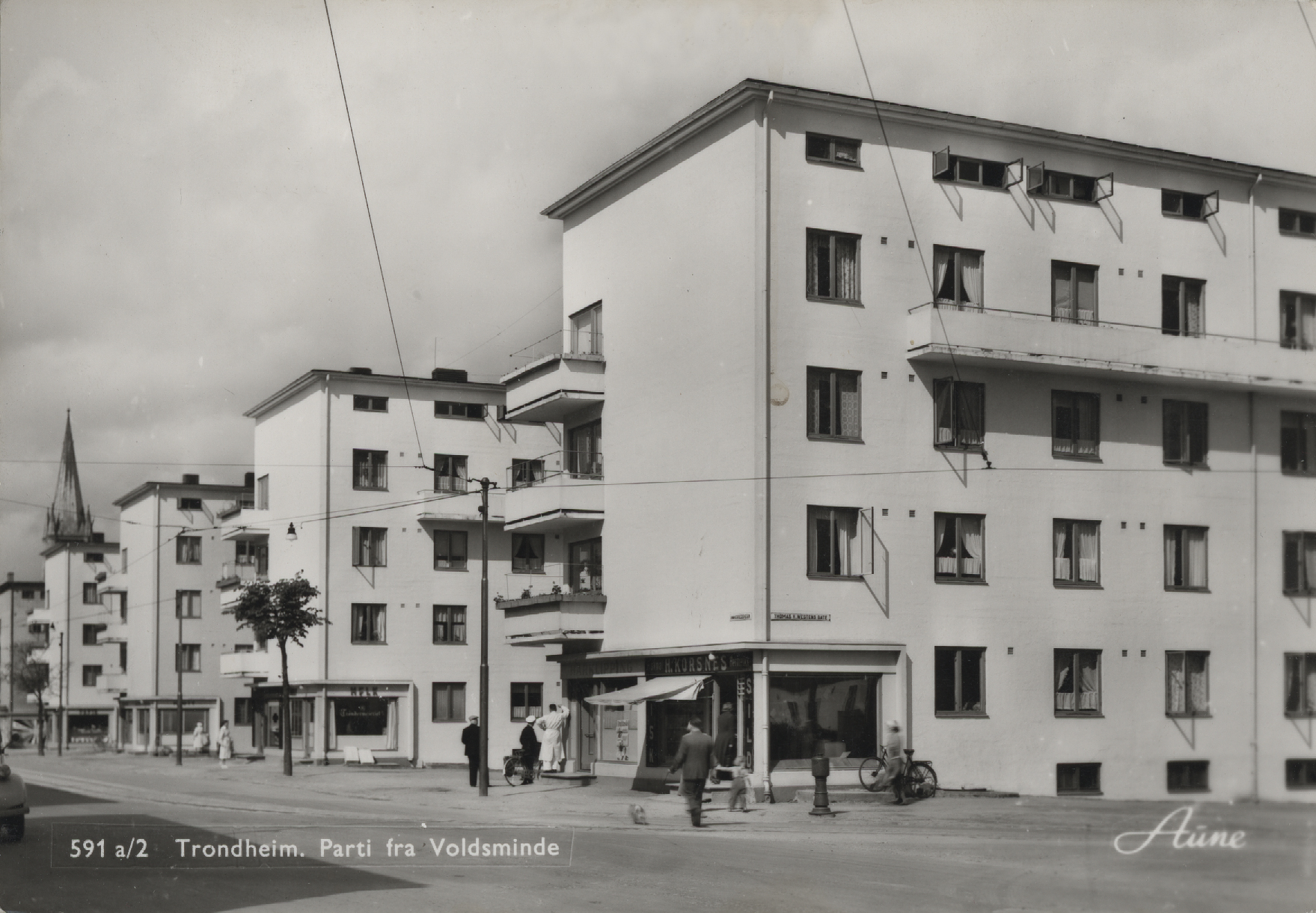 Format: Postkort Dato / Date: Ukjent Fotograf / Photographer: Aune Sted / Place: Innherredsveien, Trondheim Antikvarisk register: Innherredsveien WikiStrinda: Voldsminde Eier / Owner Institution: Trondheim byarkiv, The Municipal Archives of Trondheim Arkivreferanse / Archive reference: Tor.H45.F9818 Innherredsveien er en del av E6 og hovedgaten mot øst ut av Trondheim sentrum. Veien er første del av den landverts forbindelse mellom Trondheim og Innherred. Dette er et svært gammel veiløp, som i lang tid har vært forbindelse mellom byen og bygdene i nord og øst. (Kilde: Trondheim byleksikon, 2008)